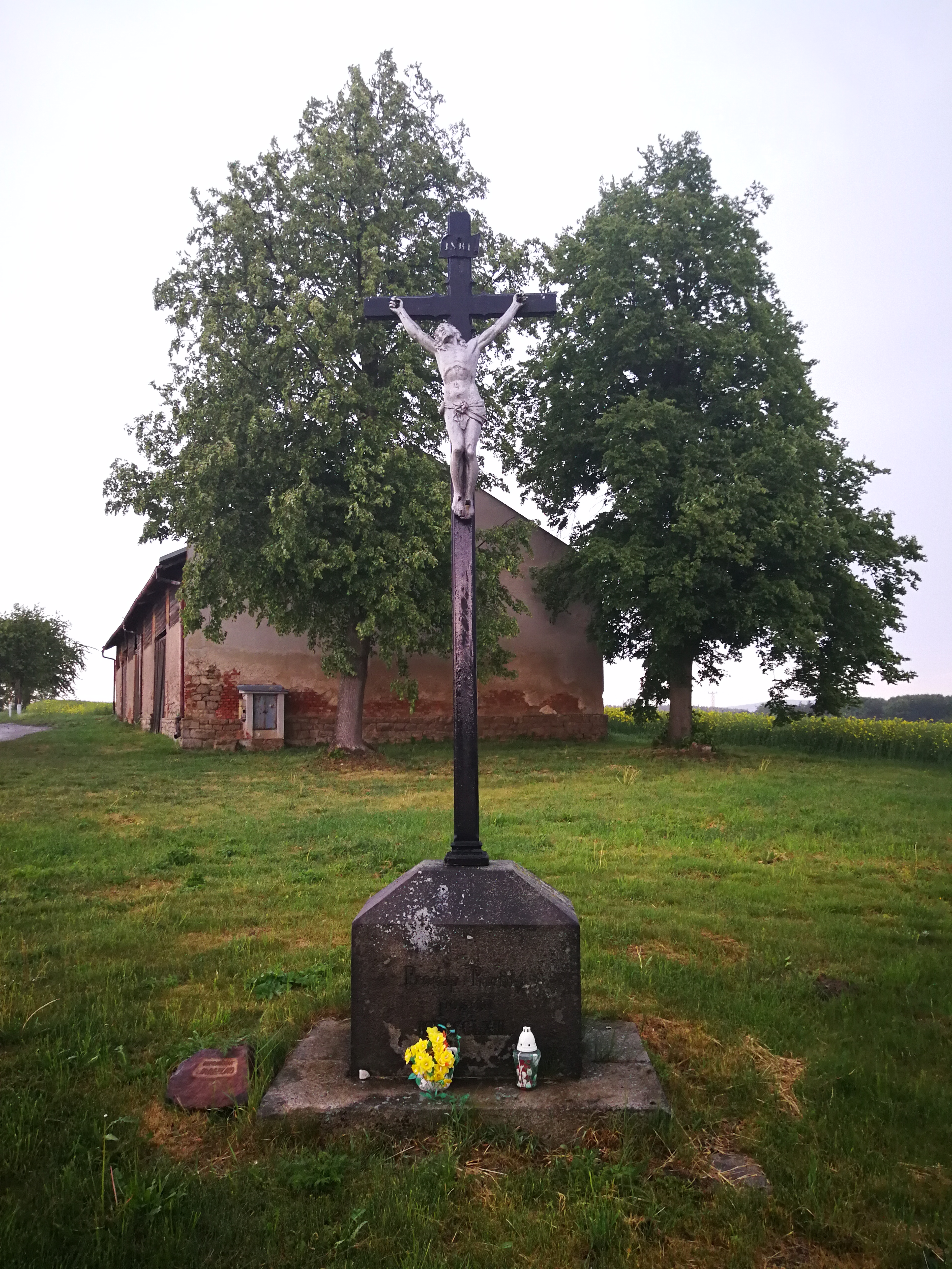 Železný kříž